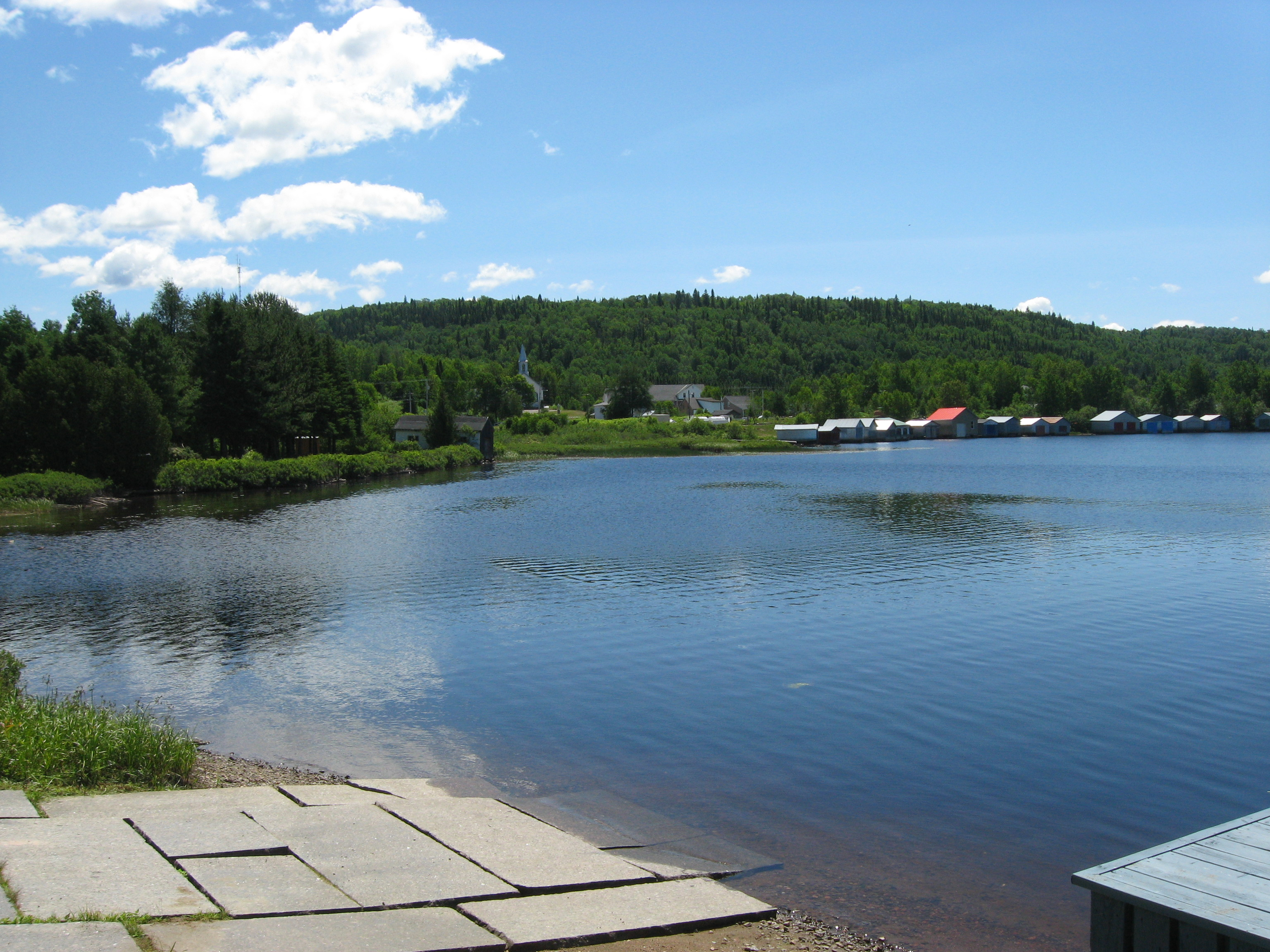 Lac-Édouard